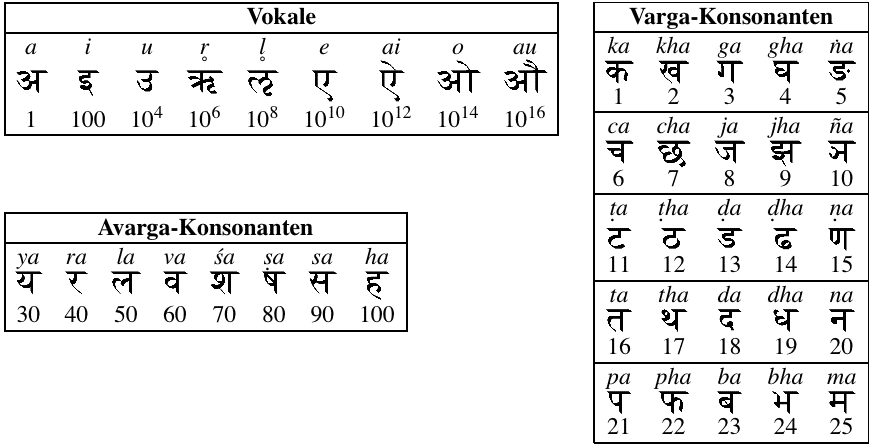 Tabellen des Aryabhata-Codes